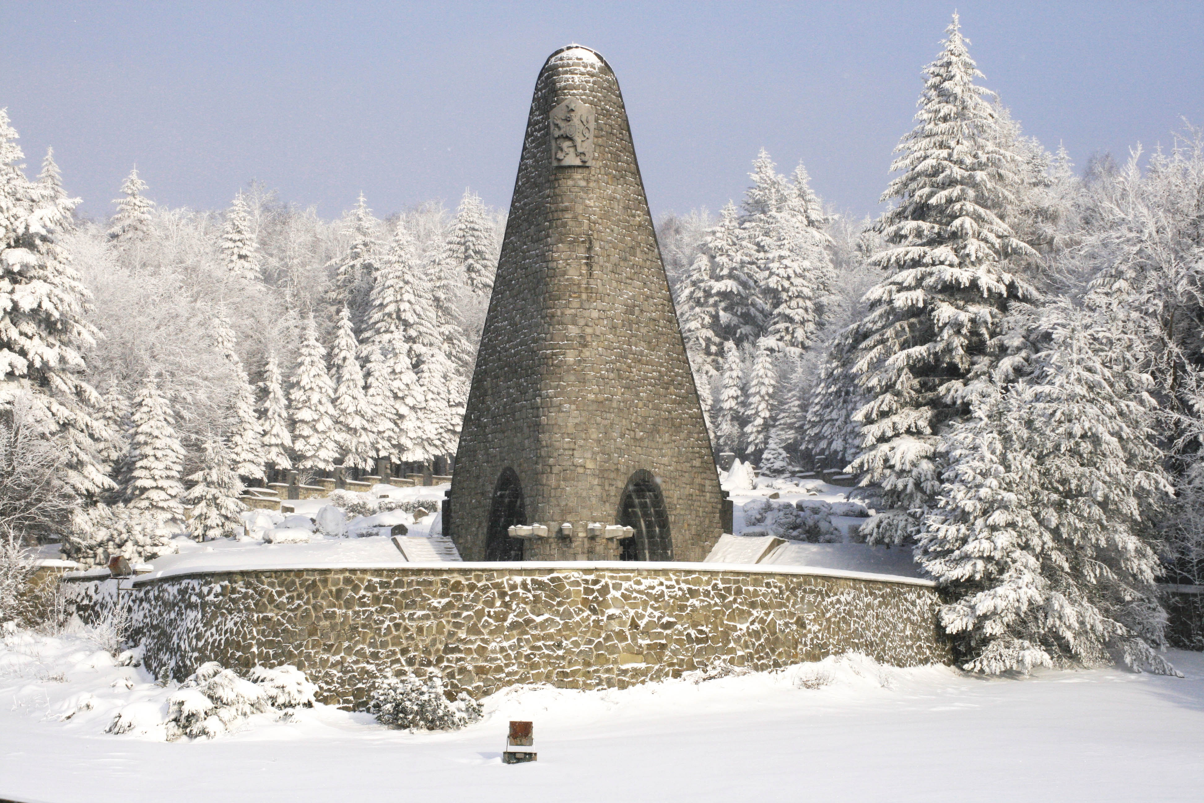 Dukliansky pamätník v januárových dňoch